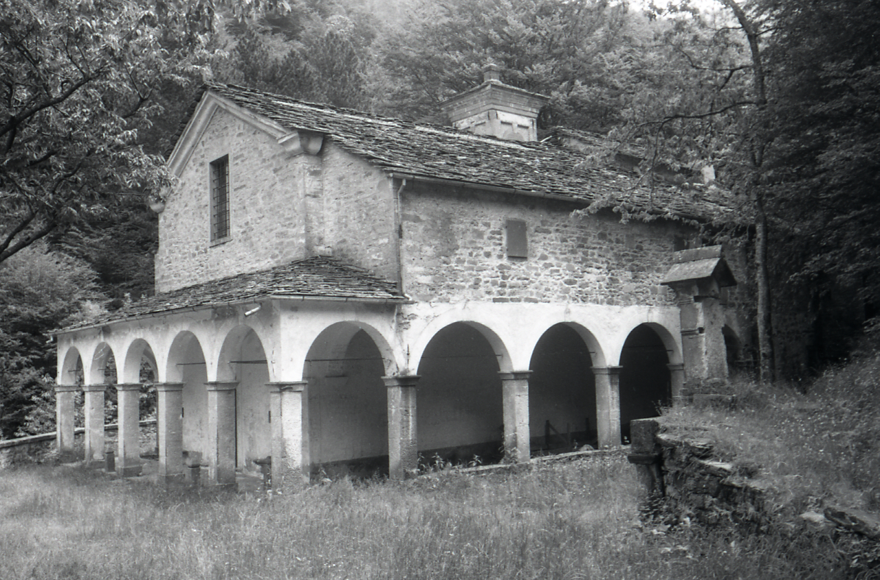 Porretta Terme, territorio. Santuario Madonna del Faggio. Castelluccio. Servizio fotografico : Porretta Terme, 1968 / Paolo Monti. - Strisce: 7, Fotogrammi complessivi: 38 : Negativo b/n, gelatina bromuro d'argento/ pellicola ; 35 mm. - ((I fotogrammi hanno una doppia numerazione. . - Sul portanegativi: d 568 Leica V Agfa 21. - Occasione: Campagna di rilevamento (prima) della provincia di Bologna (Soprintendenza per i Beni artistici e storici): Appenino bolognese ed imolese. - Camicia di Soprintendenza per i Beni Artistici e Storici: I. Carteggi/ Boolgna (1981/06/29), presso Archivio Paolo Monti. - Fonte